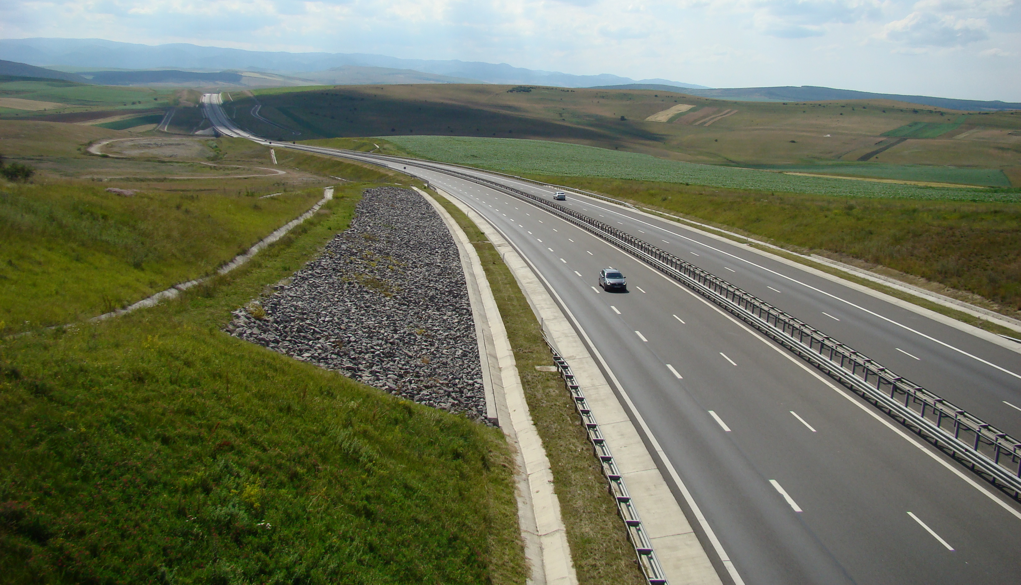 Autostrada Transilvania în apropiere de Turda